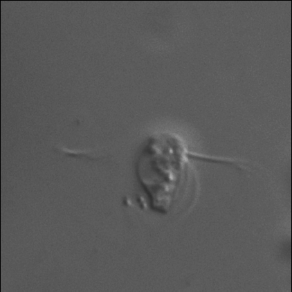 Trepomonas steini